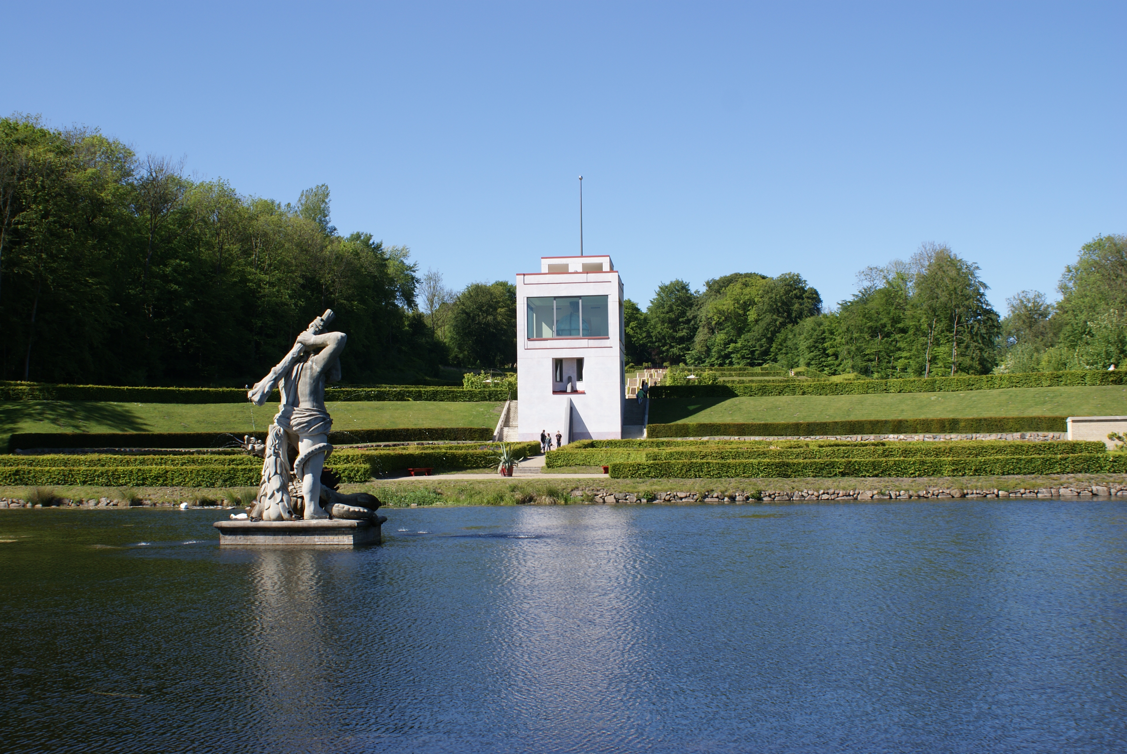 Schleswig, Schloss Gottorf, Neuwerkgarten, Herkulesteich und Globushaus